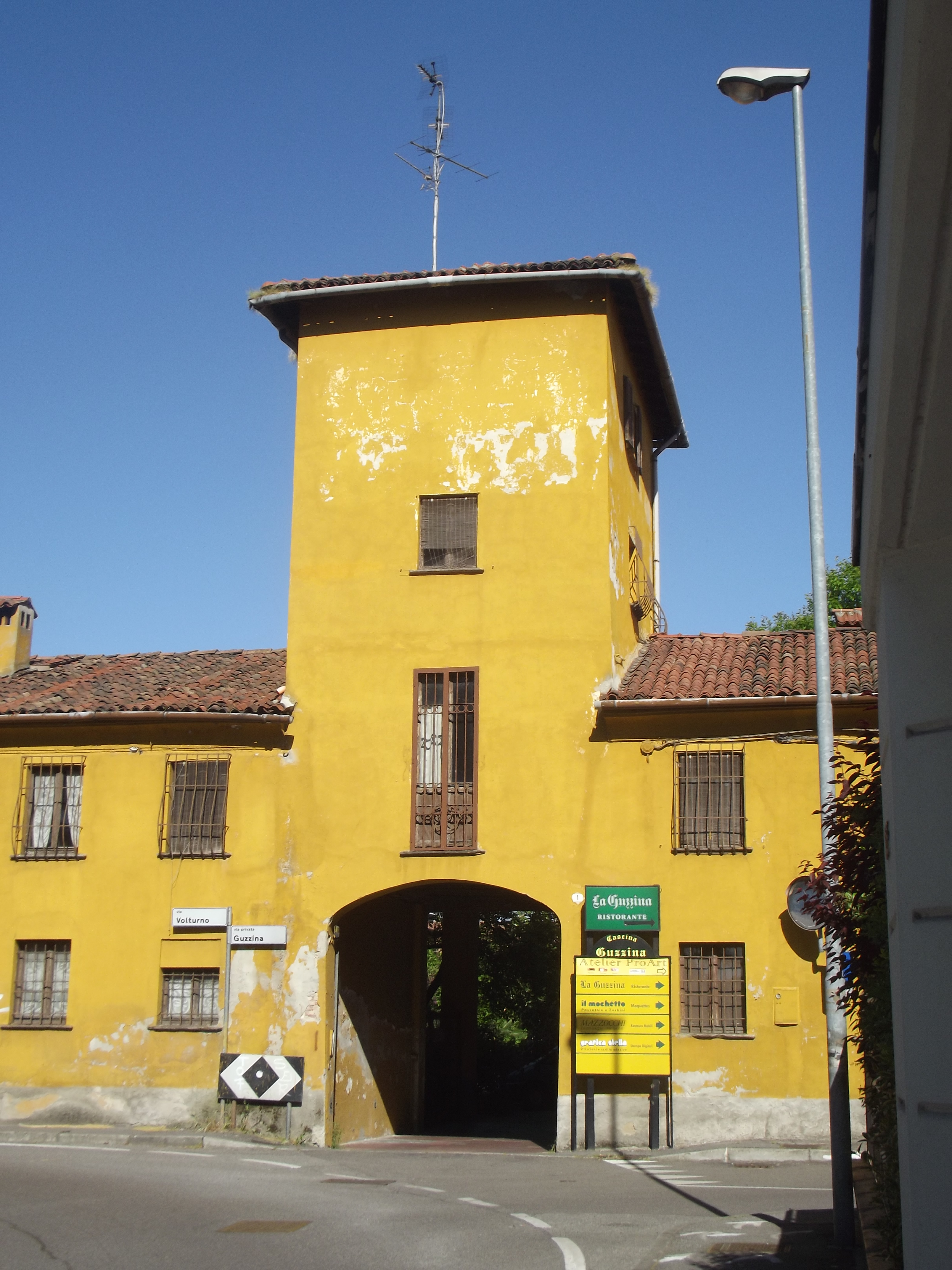 ingresso occidentale della cascina Guzzina